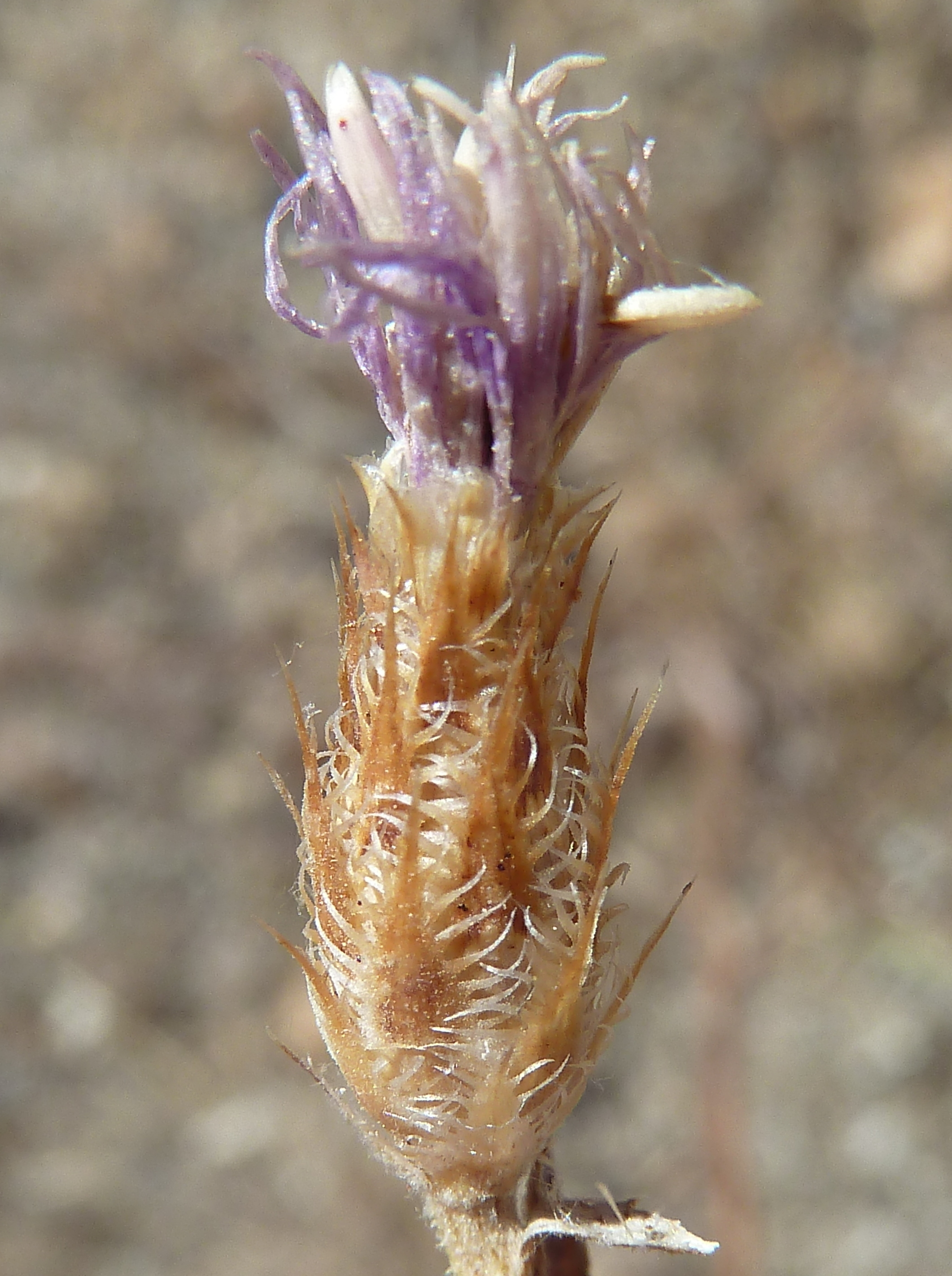 Centaurea aristata (Arsolla ) - Capítulo ya algo marchitado. - Avda del Ventero de la Condesa, El Saceral, Madrid capital (España).